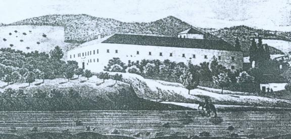 Rytina zámku Felixburg z 18. století.